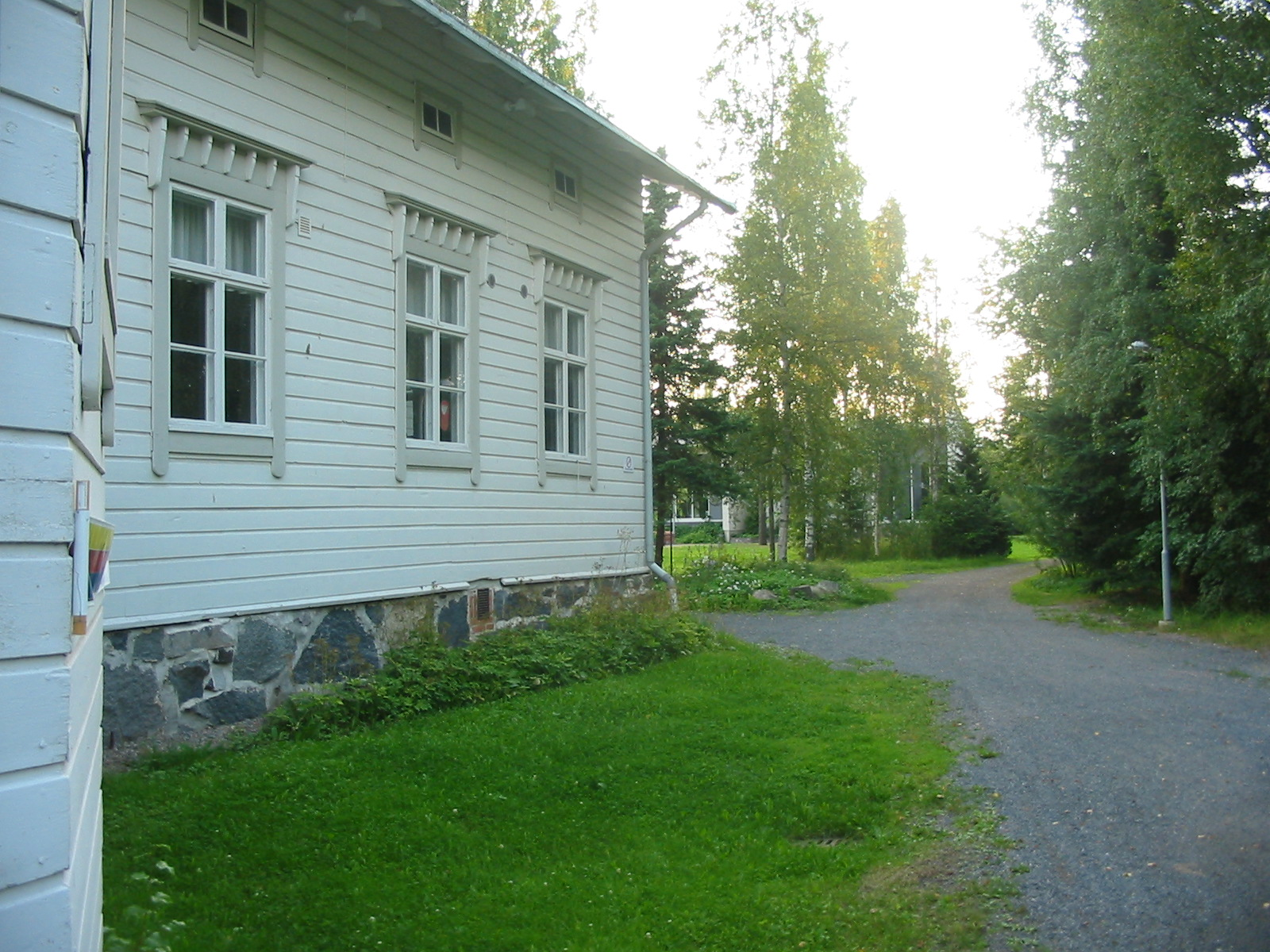 Kiiruun talo Somerolla